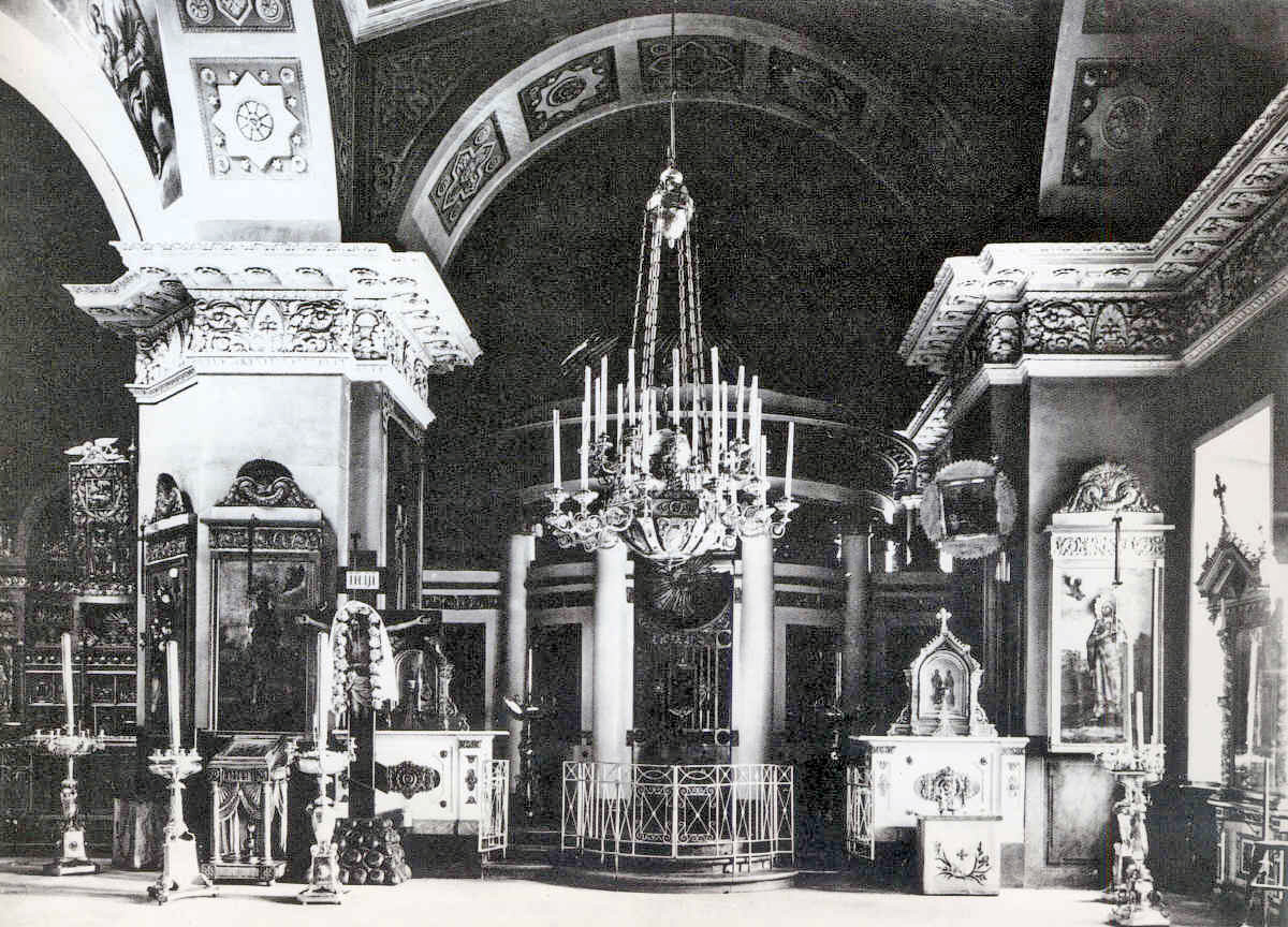 Южный придел во имя св. прав. Алексия, человека Божия в Троицком соборе Данилова монастыря